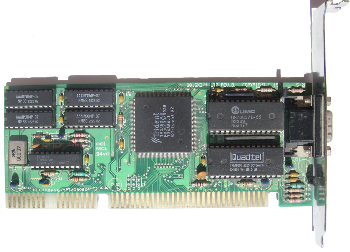 Видеокарта Trident TVGA9000B 512k для шины ISA